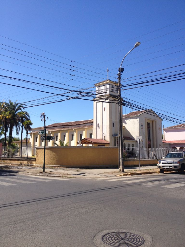 Parroquia de San Luis Gonzaga, en Talca, vista desde otra perspectiva.